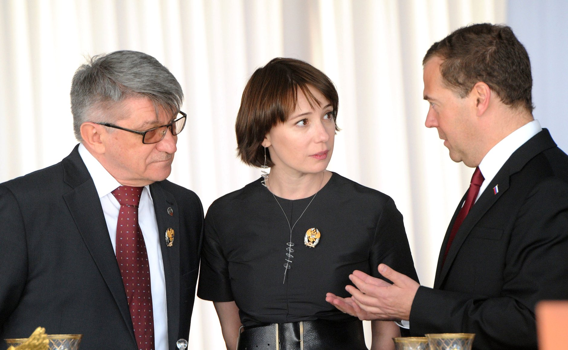 Председатель Правительства Дмитрий Медведев и лауреаты Государственной премии Российской Федерации Чулпан Хаматова и Александр Сокуров на торжественном приёме случаю Дня России